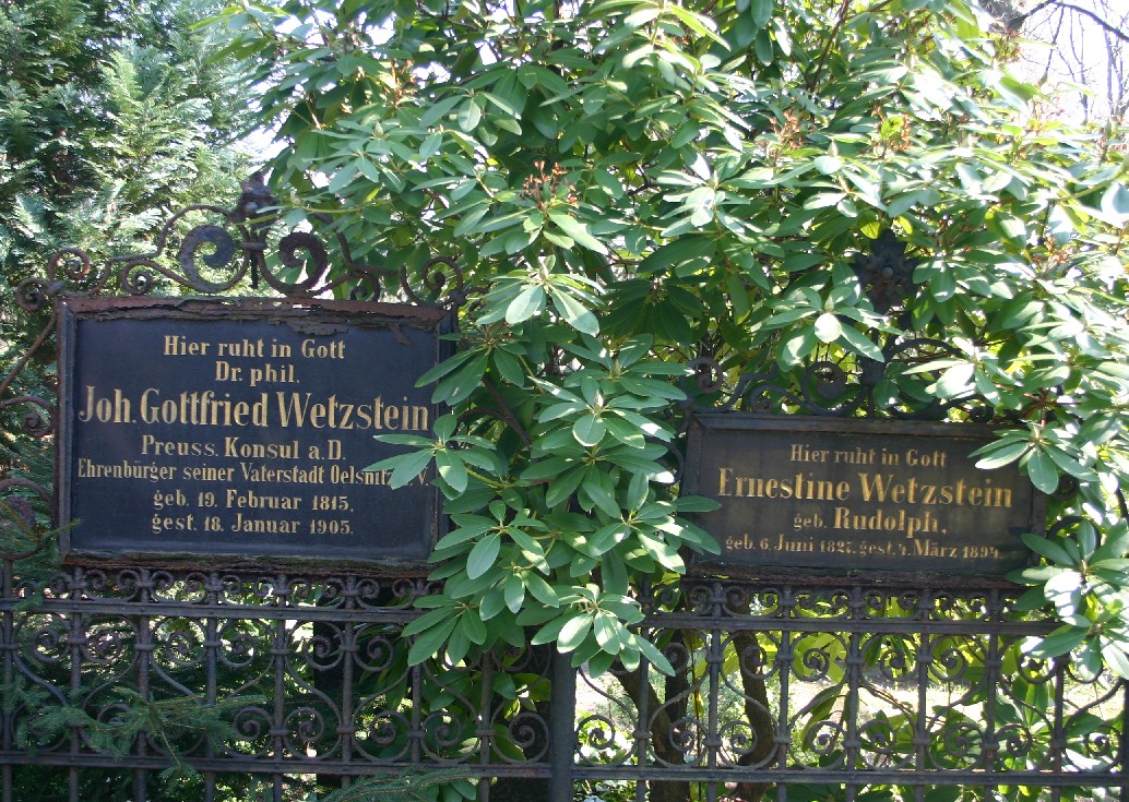 Grabstein des Diplomaten Johann Gottfried Wetzstein und seiner Frau Ernestine auf dem Friedhof II der Sophiengemeinde Berlin.